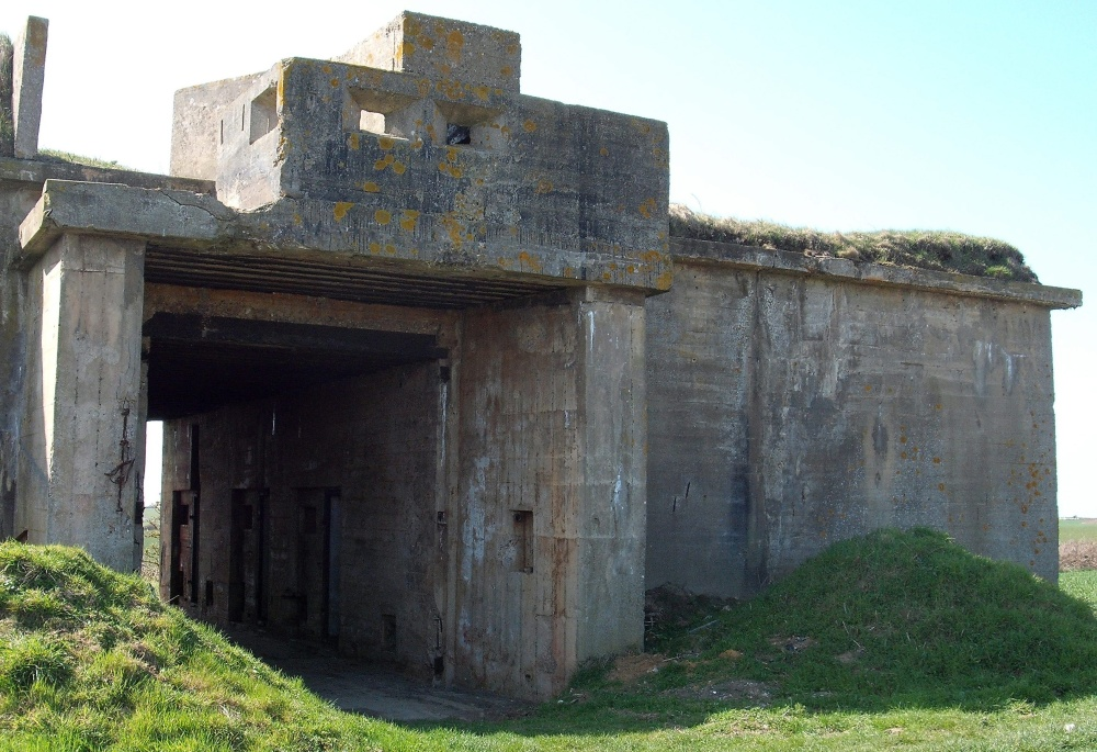 Dépôt de munitions de la batterie Großer Kurfürst. - Audinghen, France